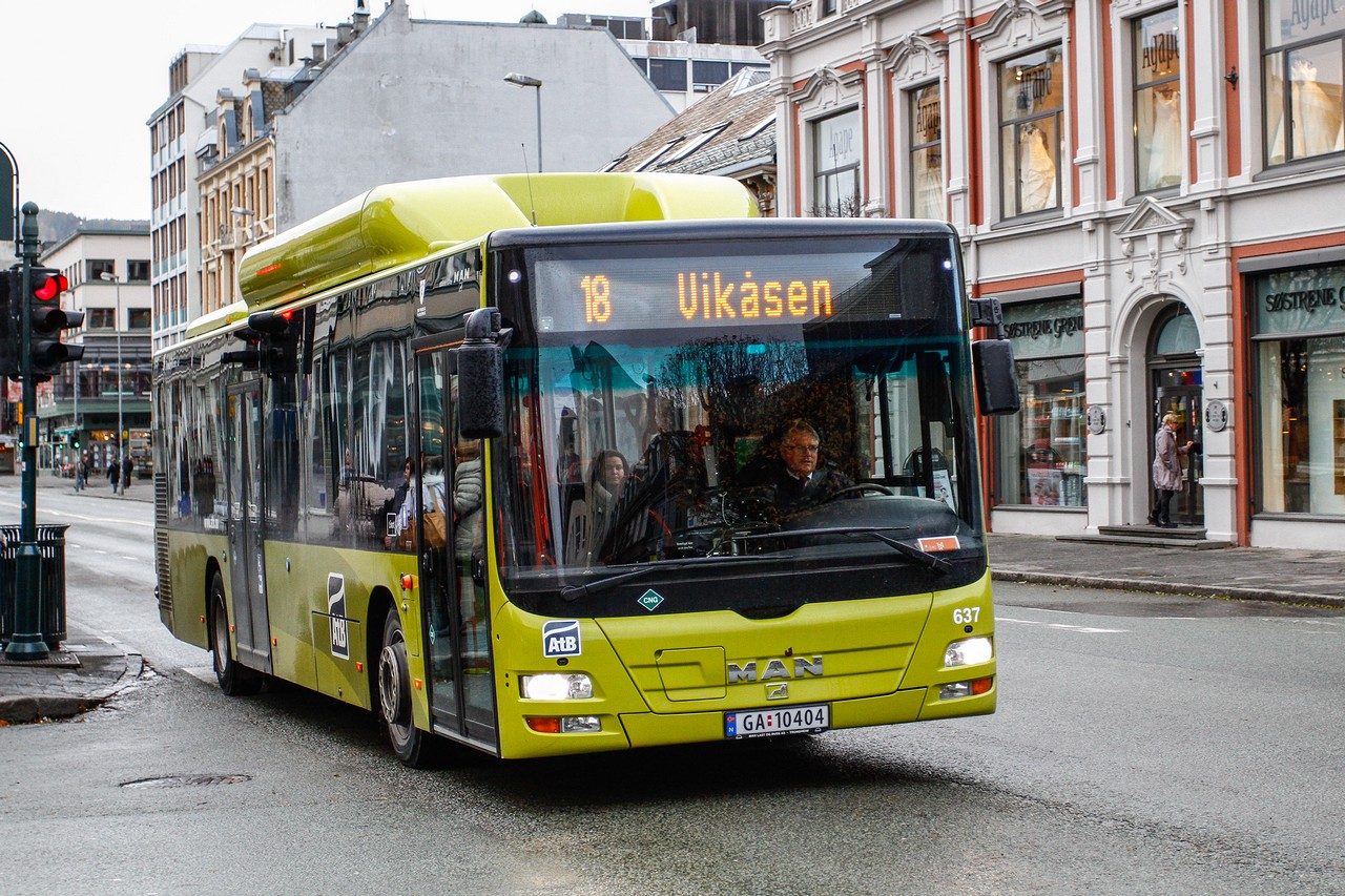 Trondheim